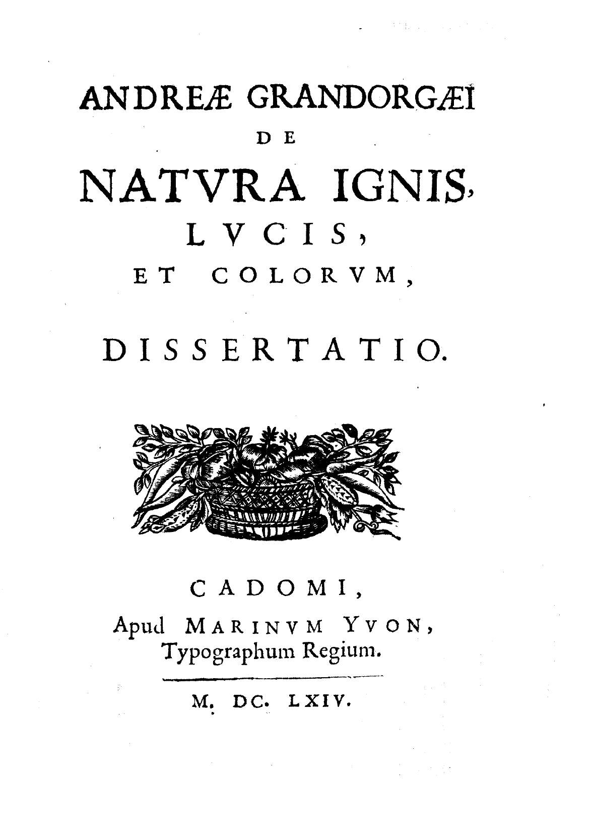 Frontespizio